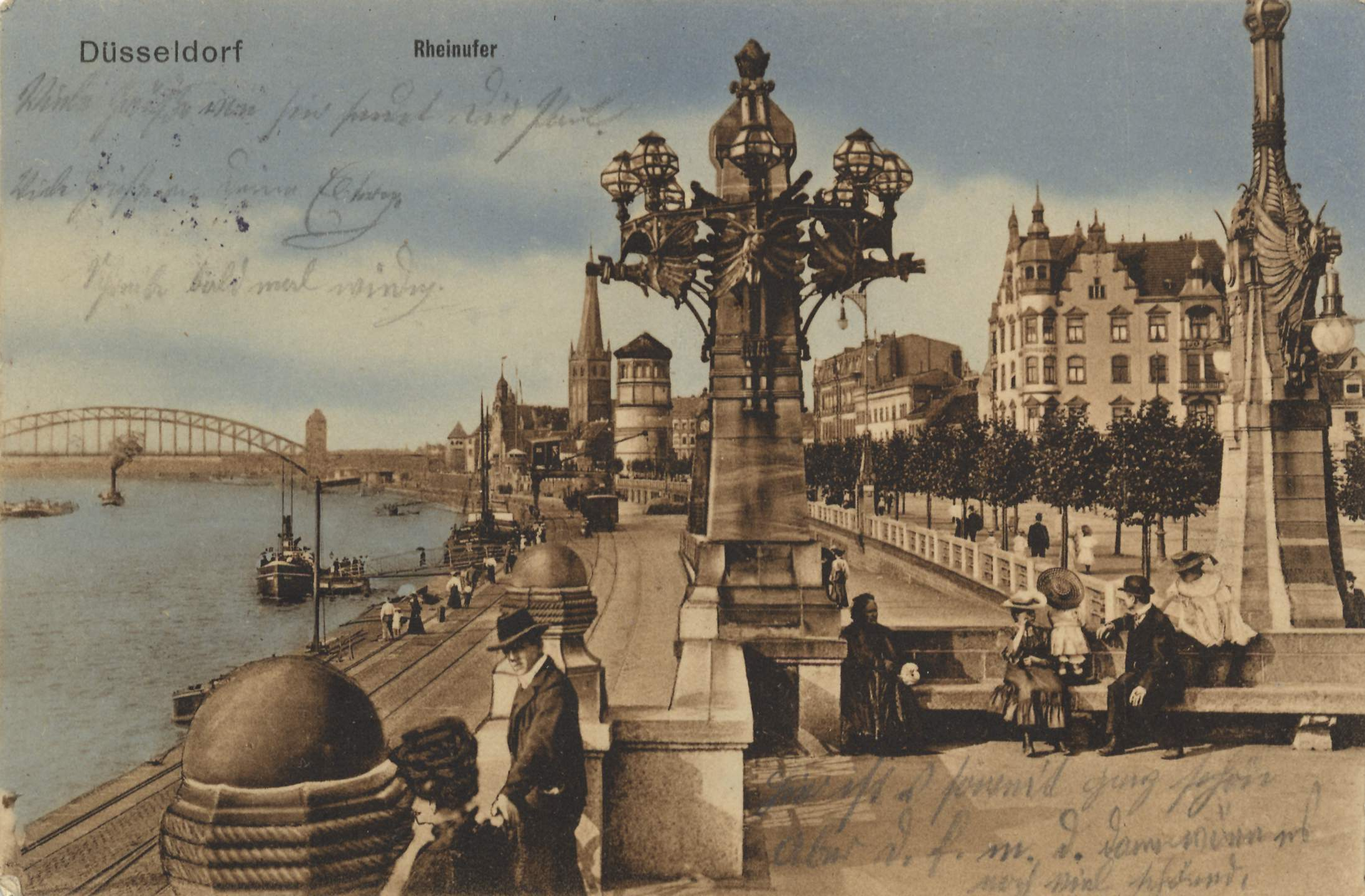 Düsseldorf, Rheinuferpromenade um 1900